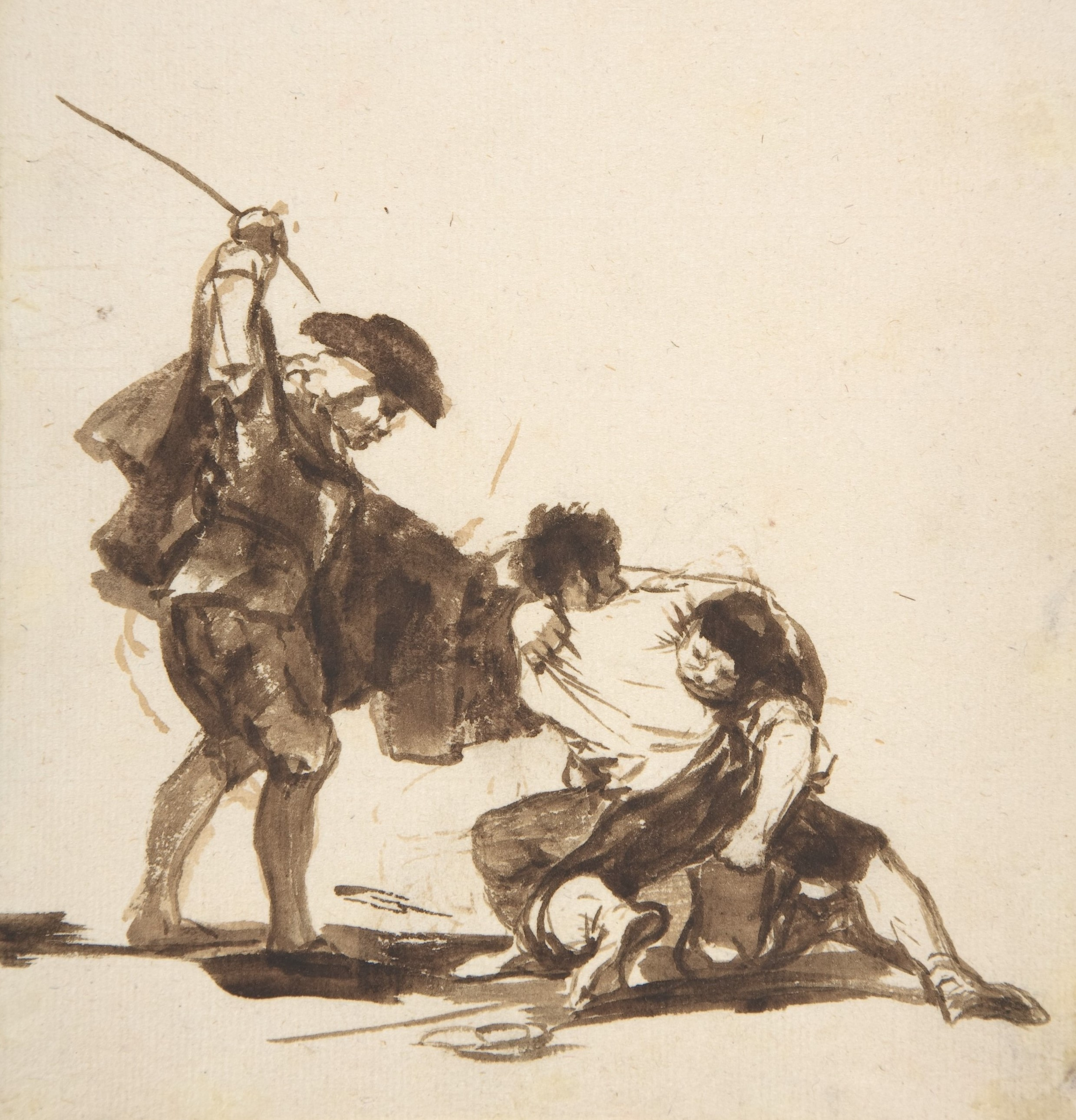 Drawing; Drawings